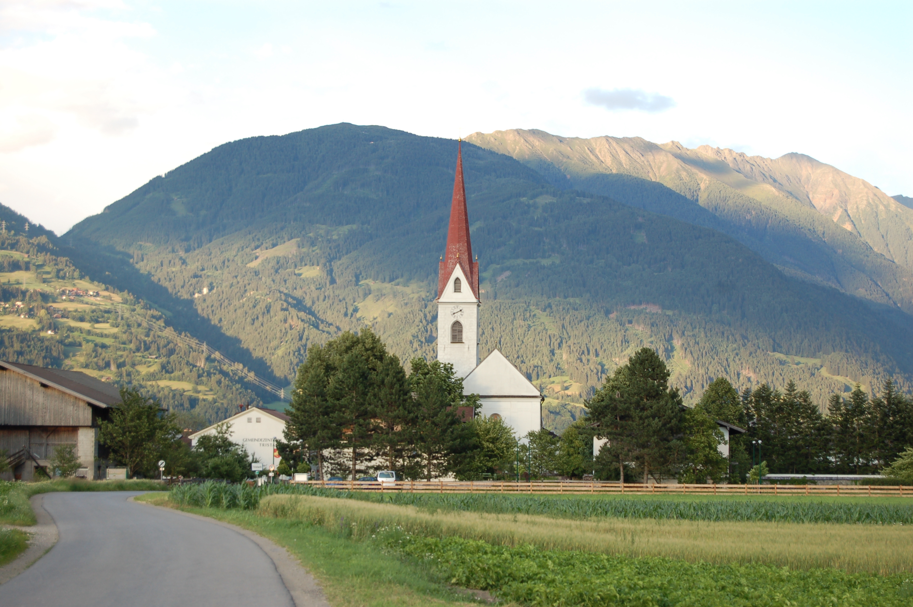 Die denkmalgeschützte Pfarrkirche in der Gemeinde Tristach im Bezirk Lienz (Tirol).